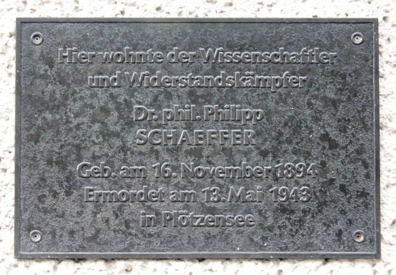 Gedenktafel für Philipp Schaeffer. Dorotheenstraße 68, Berlin-Mitte. Enthüllt 1975.